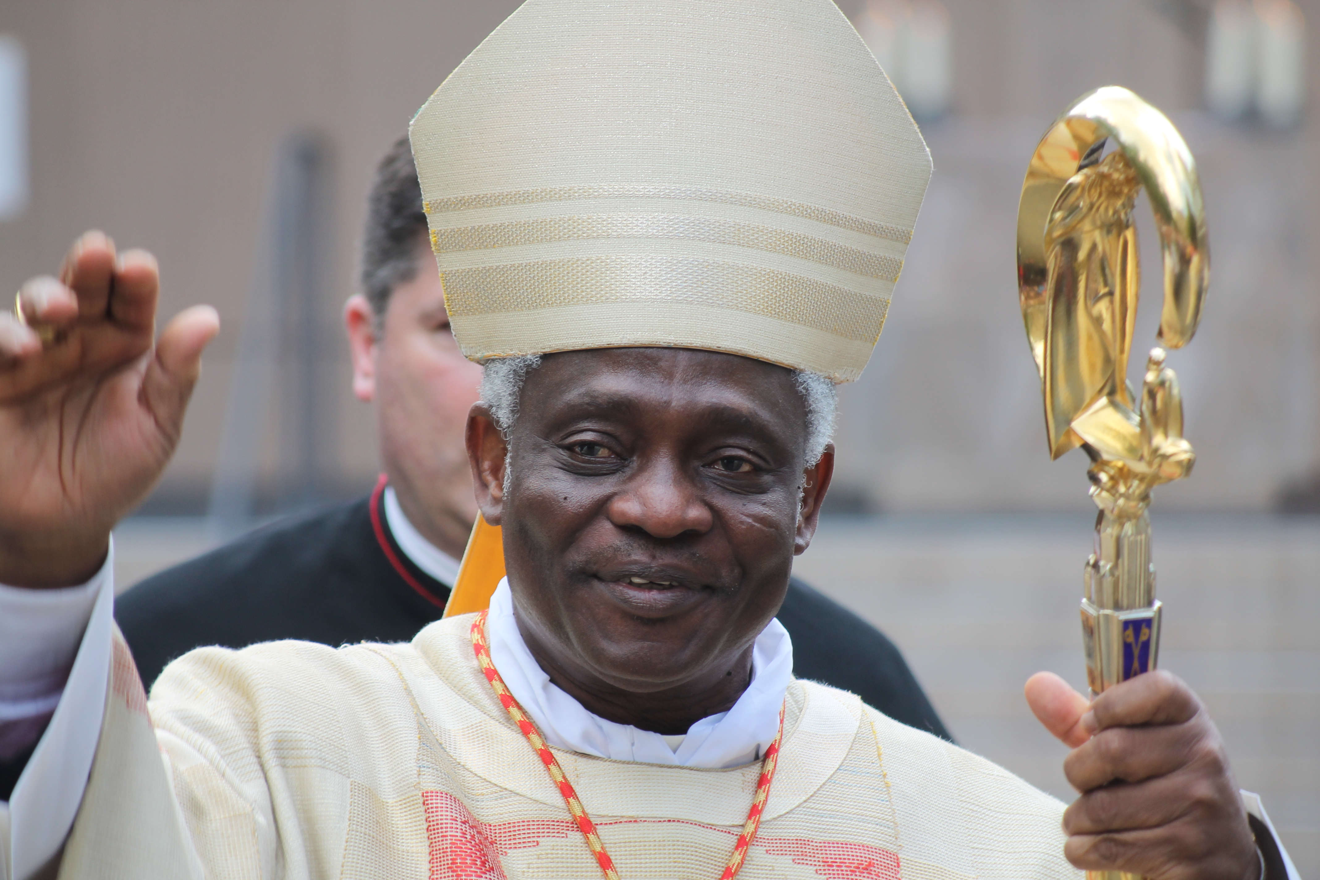 Peter Kardinal Turkson bei einer Pilgermesse auf dem Aachener Katschhof zur Aachener Heiligtumsfahrt Juni 2014